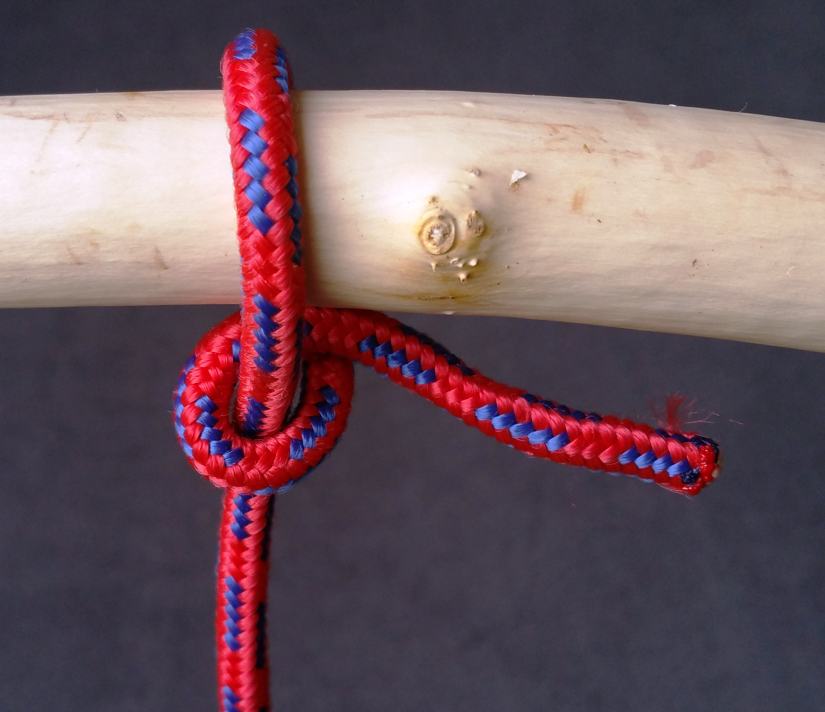 Halber Schlag mit linksgängigem Auge und stehender Part links